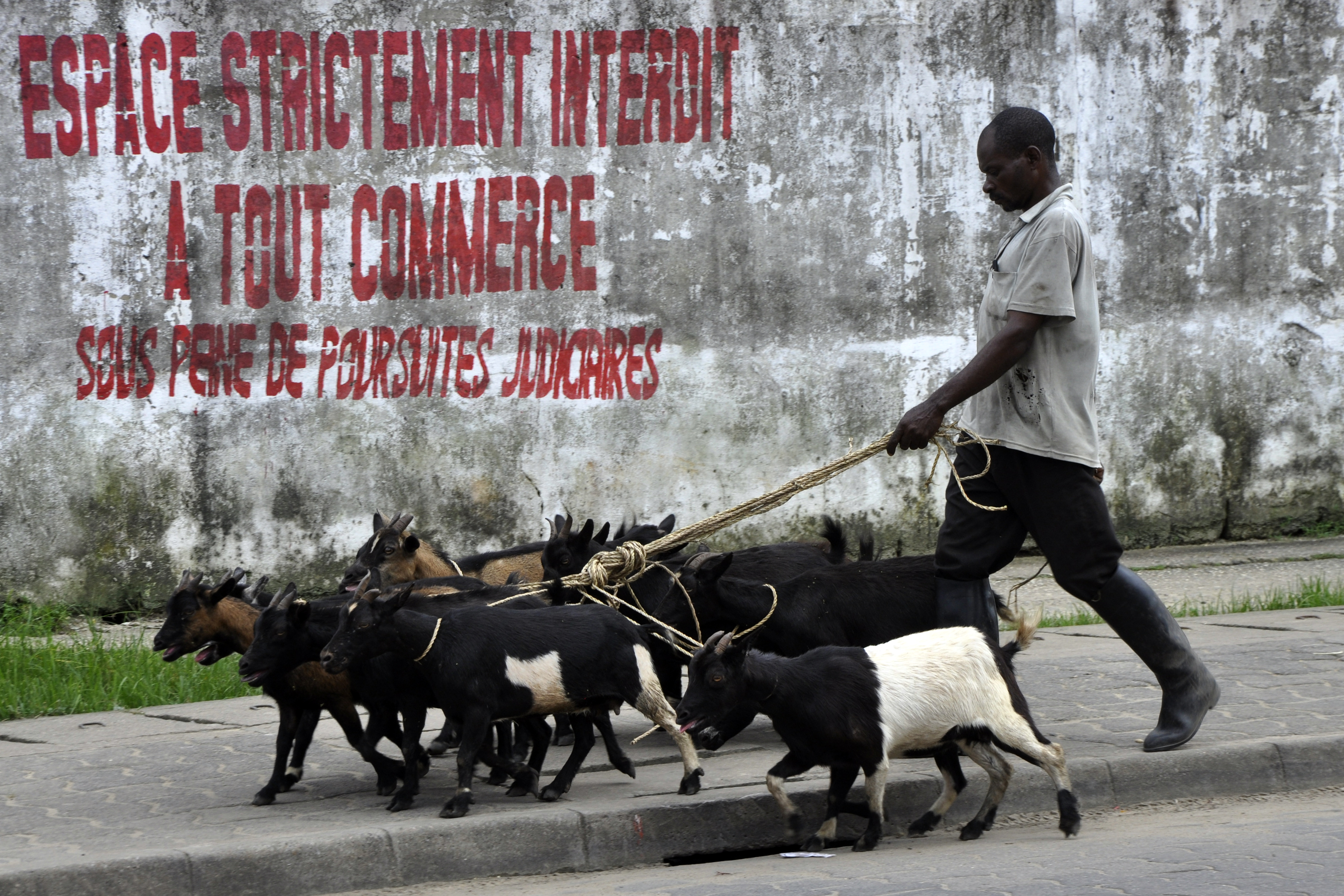 Les bergers trainant les chèvres dans les rue de Douala au Cameroun. This is an image with the theme "Africa on the Move or Transport" from: Cameroon